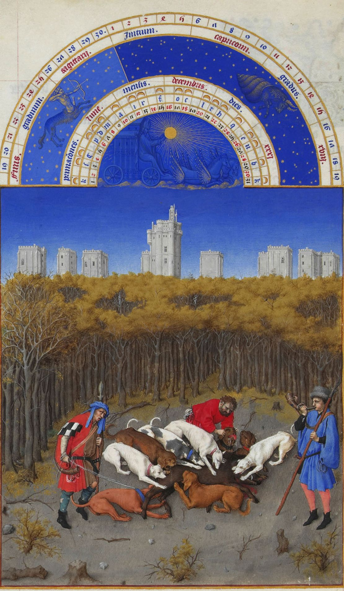 Pour le dernier mois de l'année, le peintre n'a pas retenu l'iconographie traditionnelle de la tuerie de cochon pour Noël pour préférer une scène de vénerie. Il s'agit plus précisément de la curée, au moment où l'un des chasseurs, à droite, achève de sonner l'hallali. Les chiens dépècent le sanglier. La scène se déroule au centre d'une forêt dont les arbres sont encore en feuilles. À l'horizon se dresse le château de Vincennes, achevé par Charles V, avec son donjon central et ses tours.